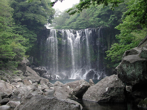 Flickr image